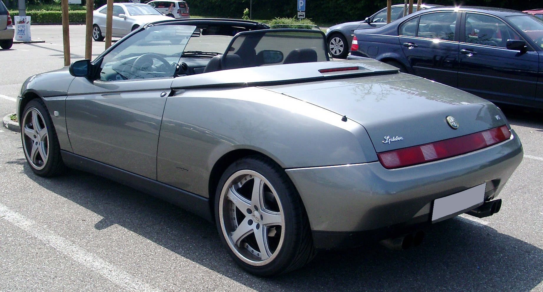 Alfa Romeo Spider, 5. Generation